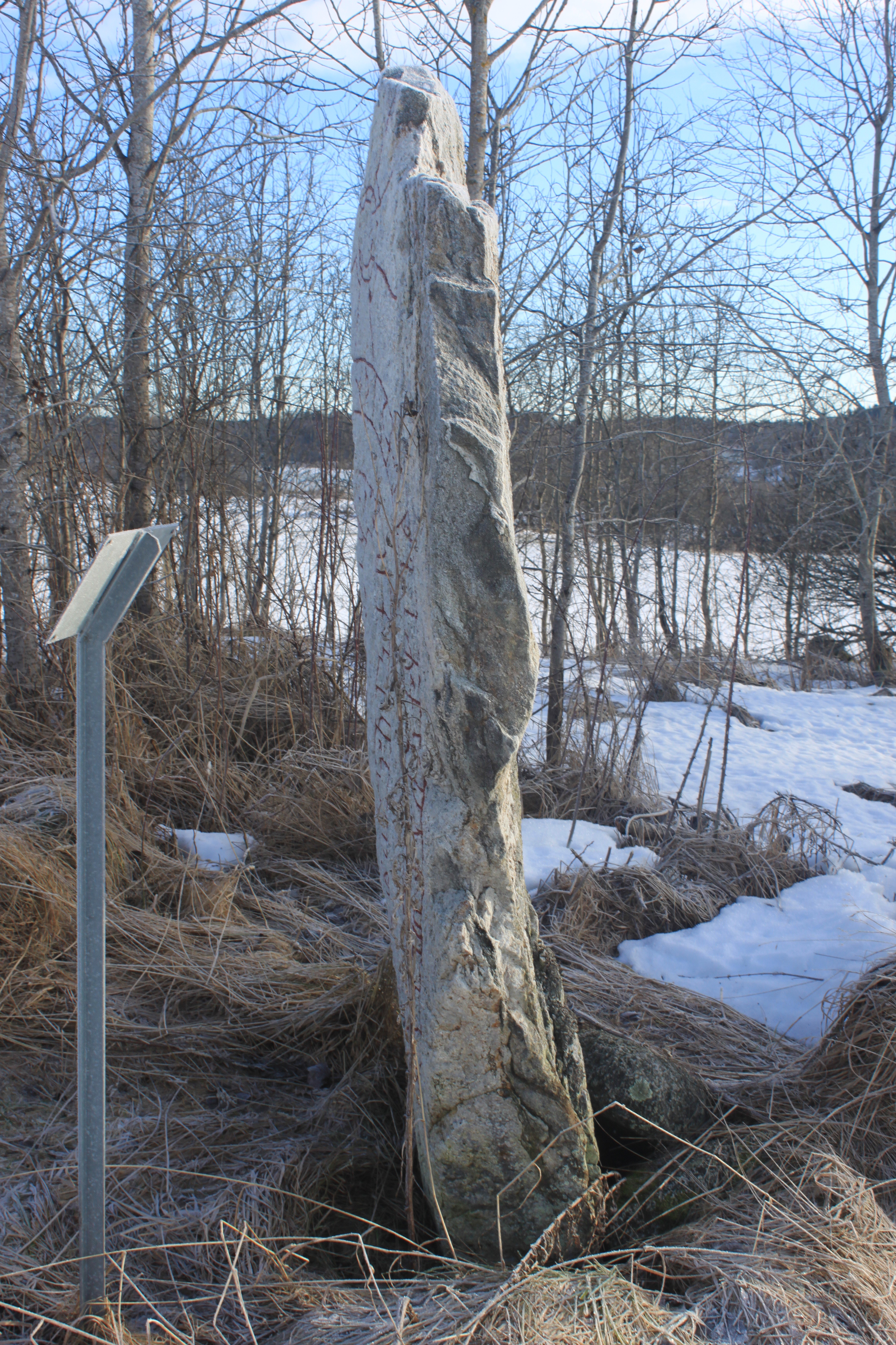 Närtuna 27:2. Runristning. Fast fornlämning. (U 504).